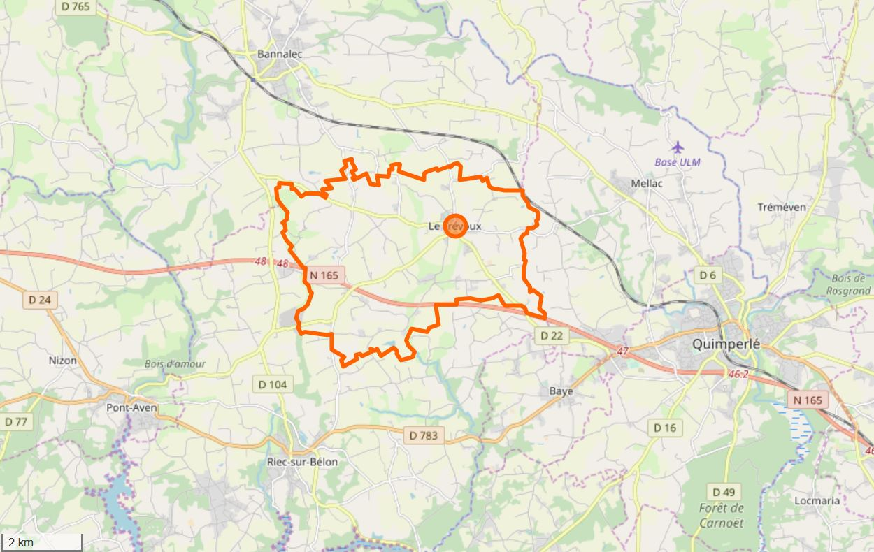 Cette carte a été créée à partir des données du projet Openstreetmap. This map may be incomplete, and may contain errors. Don't rely solely on it for navigation.